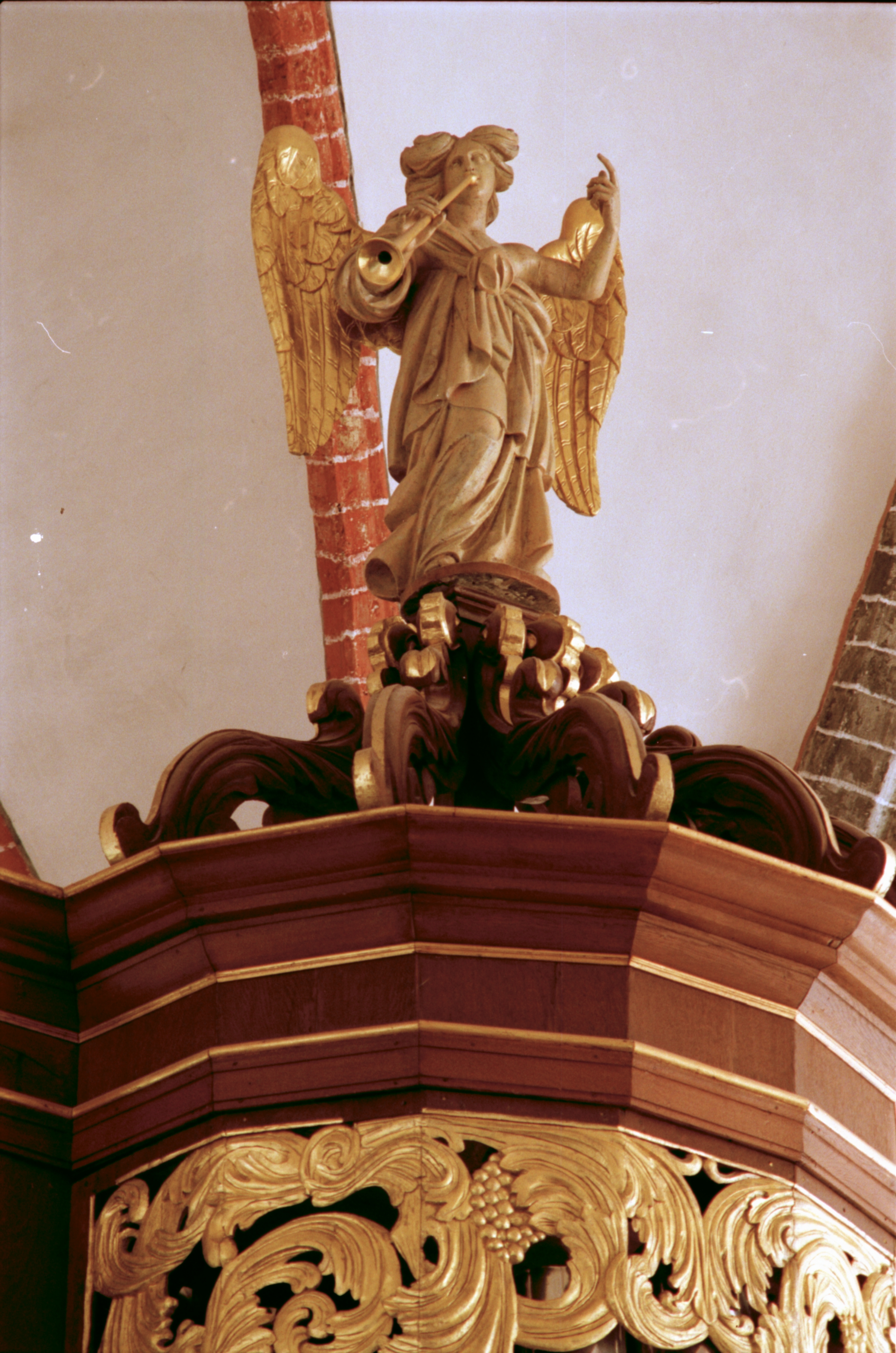 Norden Ludgeri, Orgel, Engel auf dem Pedalturm